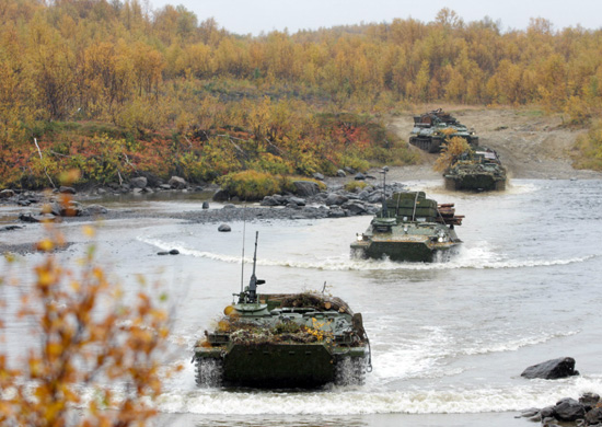 Подразделения отдельной мотострелковой бригады Западного военного округа (ЗВО), дислоцированной в Заполярье,отрабатывают ведение маневровых тактических действий в обороне.